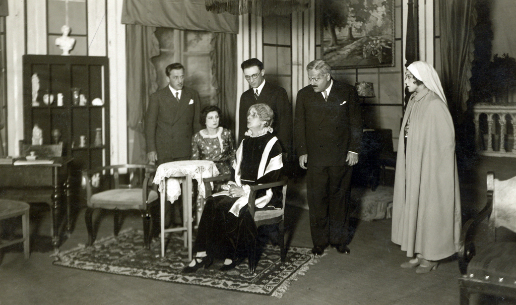 William Somerset Maugham, Sveti plamen, Narodno gledališče v Ljubljani. Na fotografiji: Ivan Levar (Colin Tabert), Mihaela Sarić (Stella), Ivan Jerman (Dr. Harvester), Maria Vera (Mrs. Tabret), Janez Cesar (Major Liconda), Mira Danilo (Sestra Wayladnova).